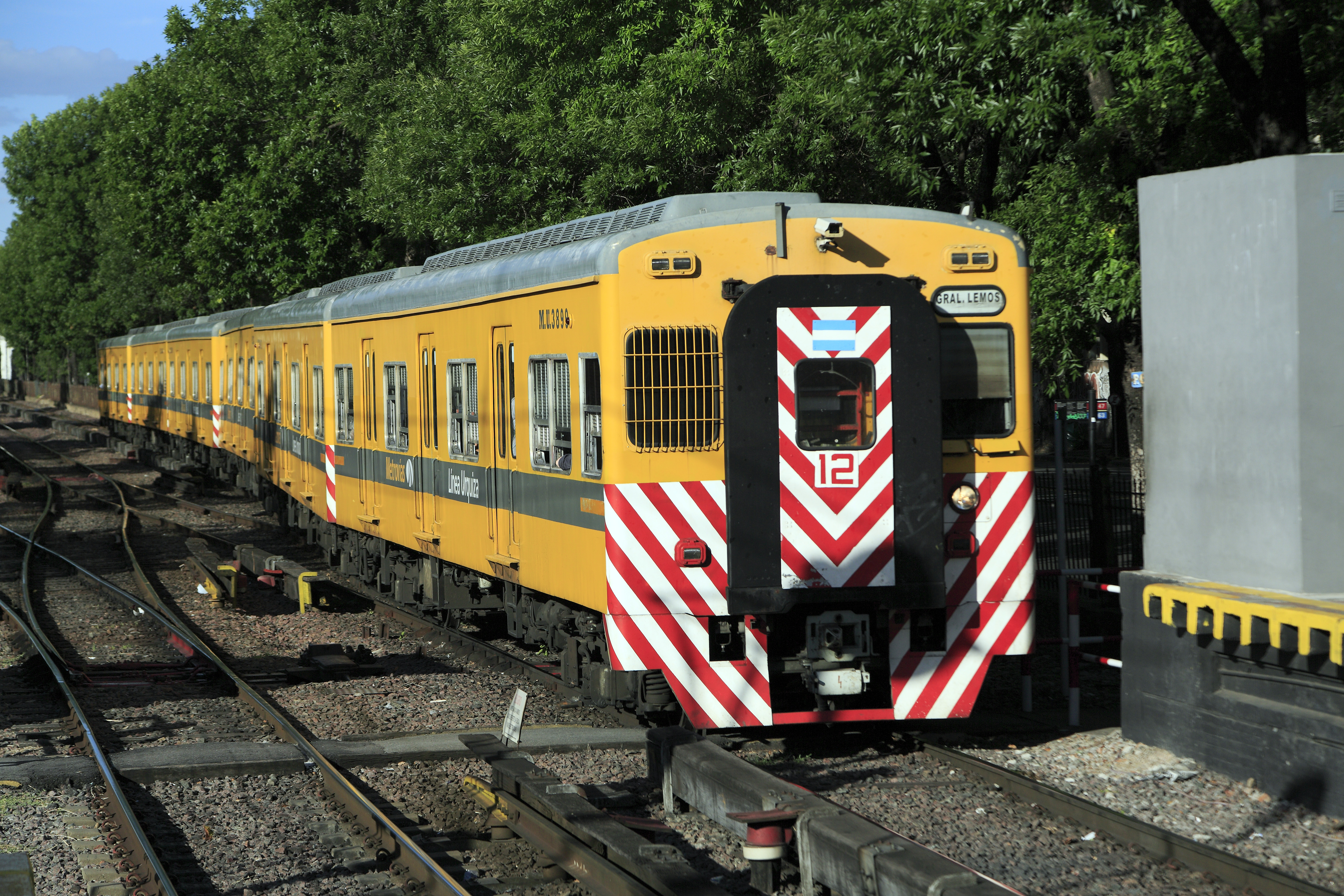 S-Bahn-Zug Federico Lacroze–General Lemos auf den Spitzenweichen des Bahnhofs Federico Lacroze. Die Toshiba-Doppeltriebwagen verkehren auf der Vorortstrecke nach General Lemos seit 1974, damit wurde die Strecke von Fahrleitungs- auf Stromschienenbetrieb mit den nur hier und auf der mit der Strecke verbundenen Linie B der U-Bahn verwendeten, von oben bestrichenen Stromschienen umgestellt. Die Züge verkehren in der Regel mit sechs Wagen, die in der Regel nicht verändert werden. Die Führerstände in Zugmitte sind in der Regel nicht auf demselben Ausrüstungsstand wie die genutzten an den Zugenden. Nur an diesen gibt es die Kameras über den Wagenübergängen.